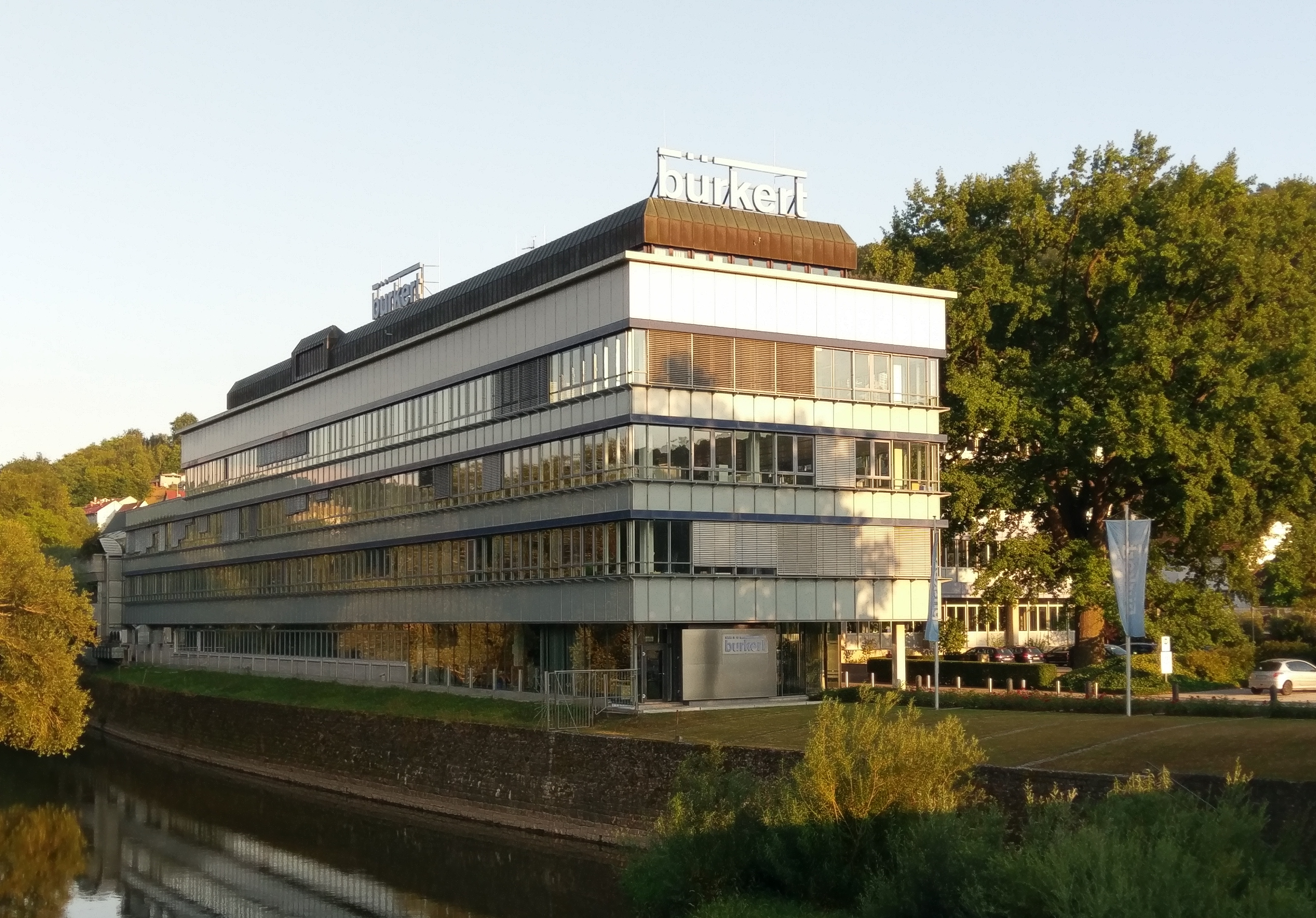 Gebäude der Bürkert Fluid Control Systems, Ingelfingen